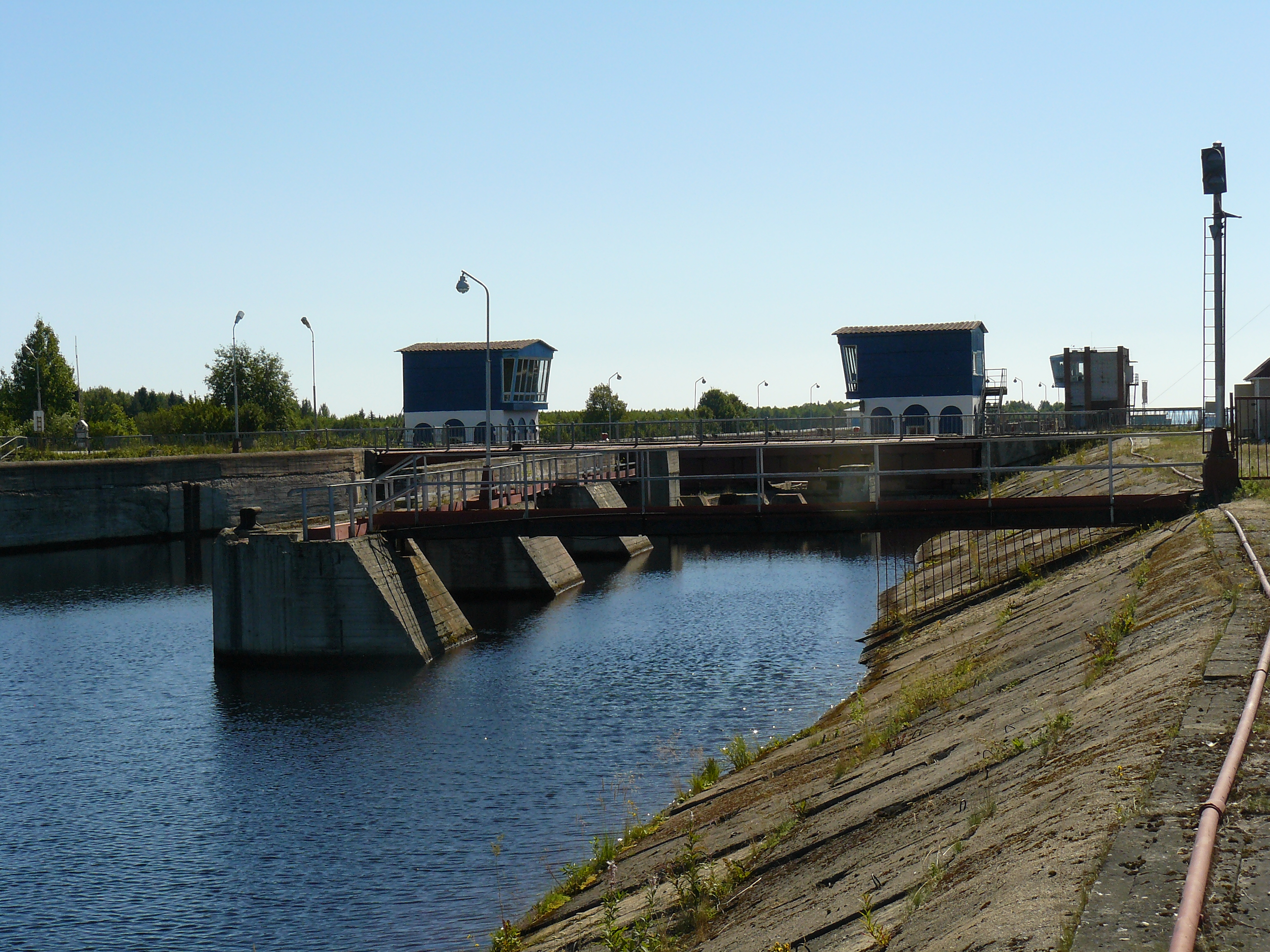 Біломорканал біля Медвеж'єгорська